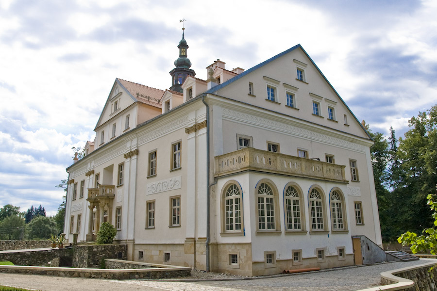 Ciechanowice, pałac (dec. zamek), pocz. XVI, XIX